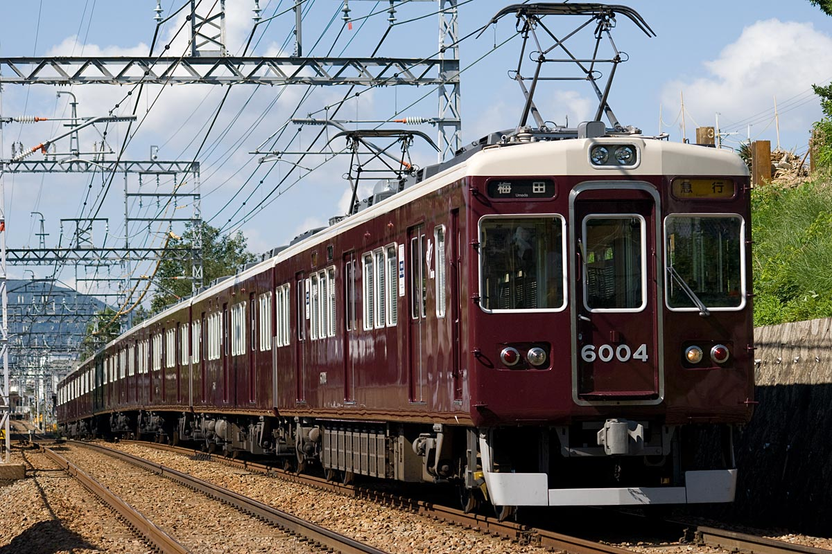 阪急6000系 6004F 山本～雲雀丘花屋敷間にて 投稿者が撮影